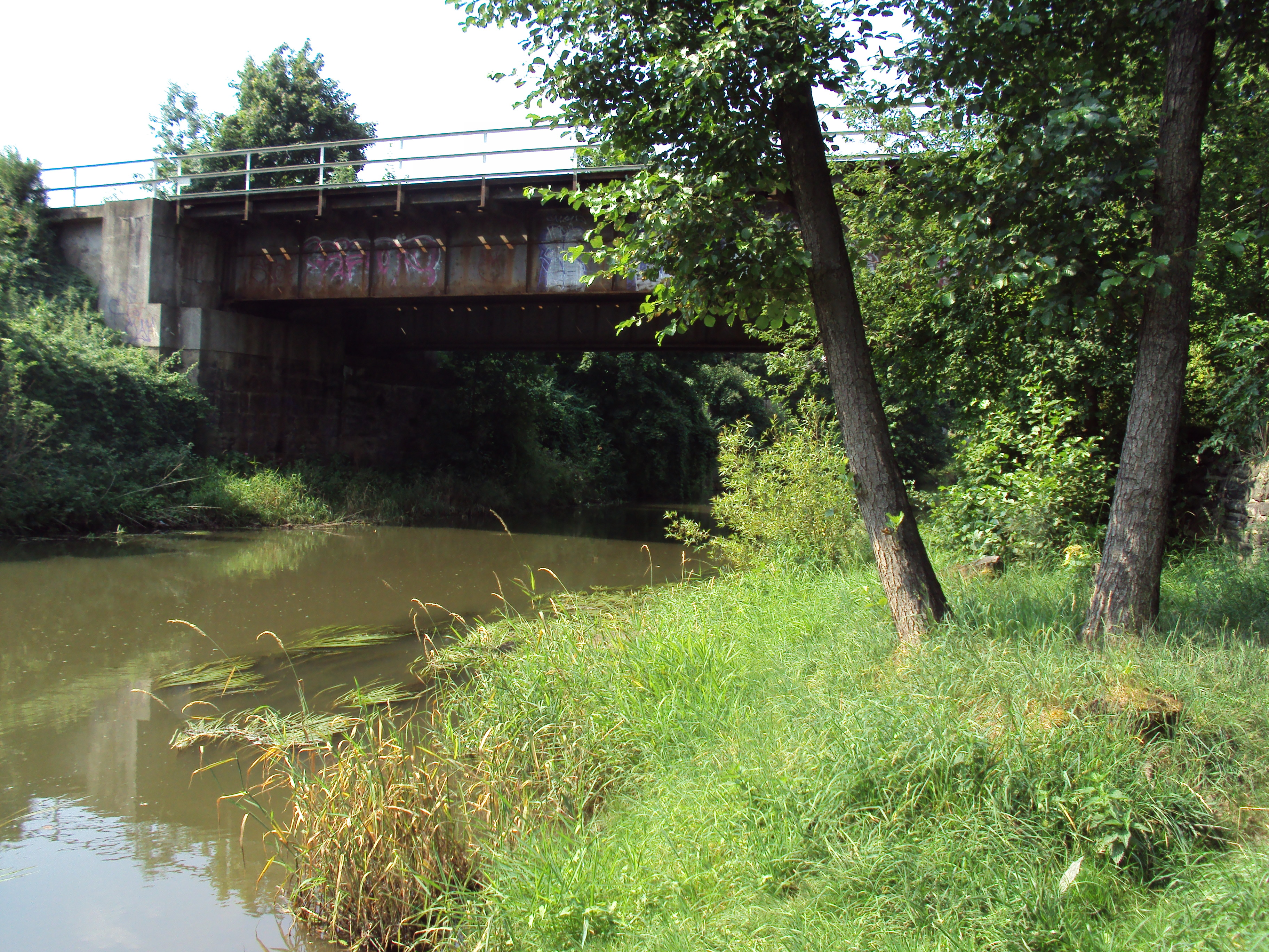 Přemostění Ploučnice na západním okraji České Lípy, trať 080